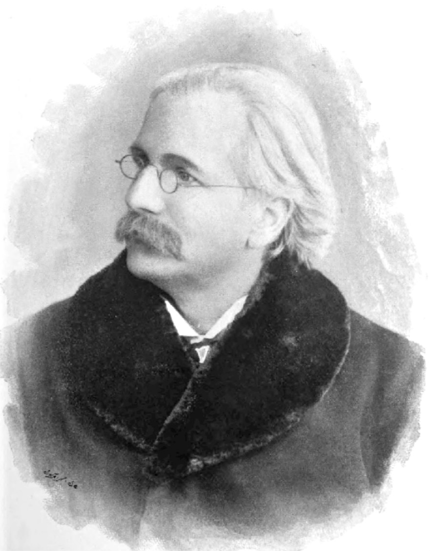 Photo of composer Joseph Parry from the book Notable Welsh musicians (of today), with portraits, biographies, and a preface on the condition of music in Wales at the present time page 13